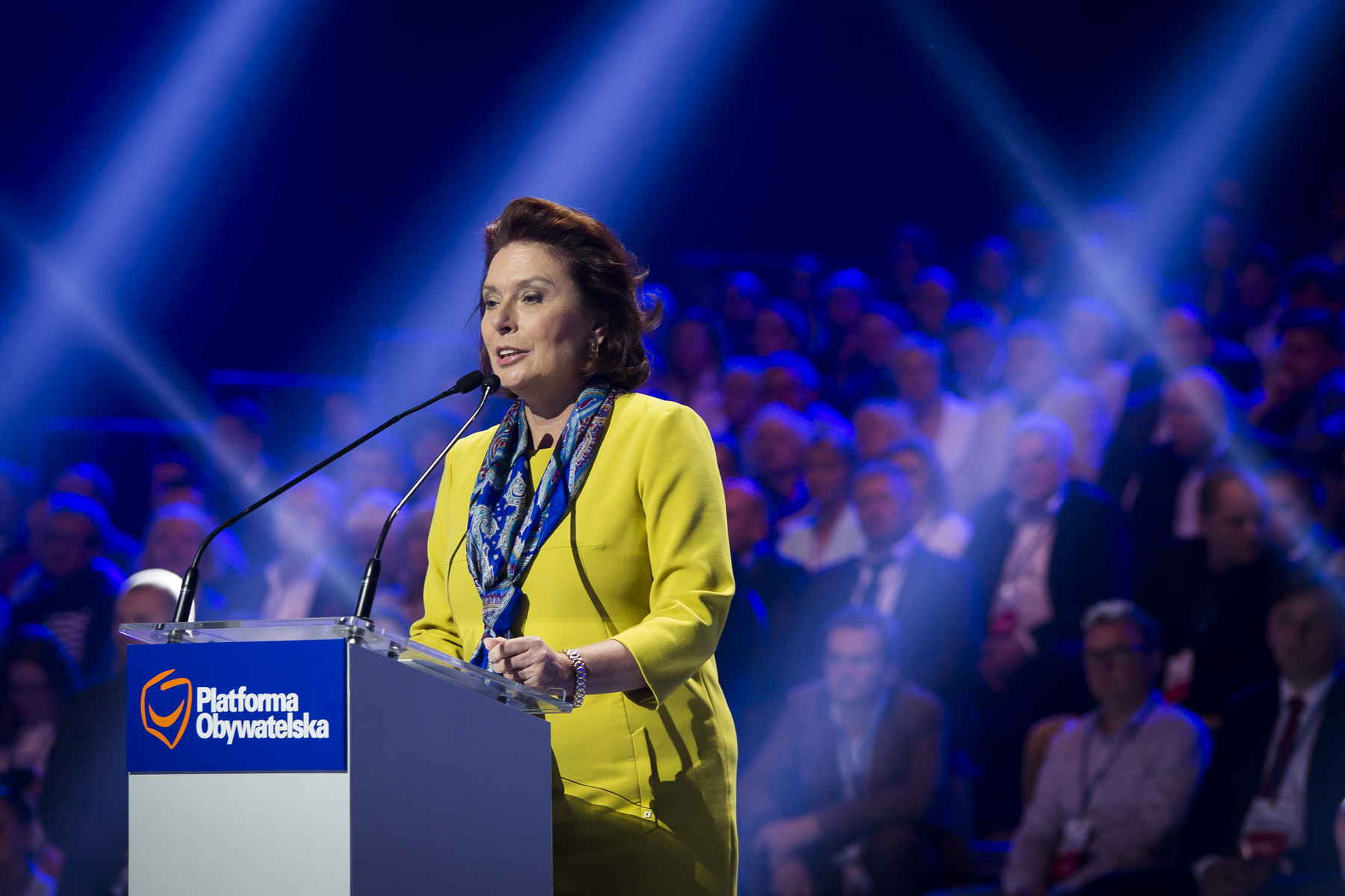 Arena Ursynów / Warszawa, Konwencja PO RP, 20.06.2015, fot. Ewelina Lach